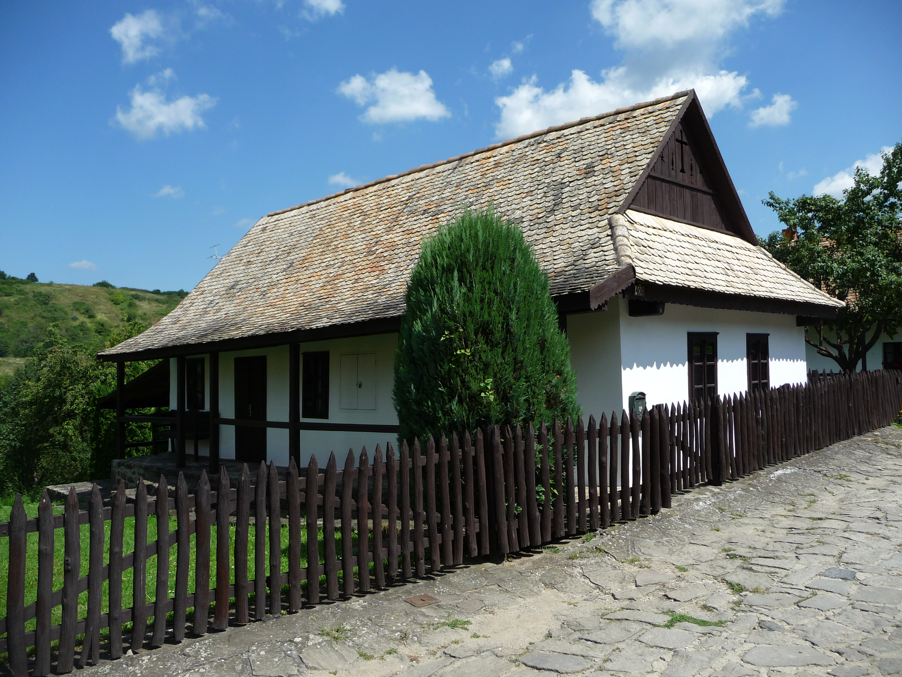 Hollókő, Kossuth u. 103.